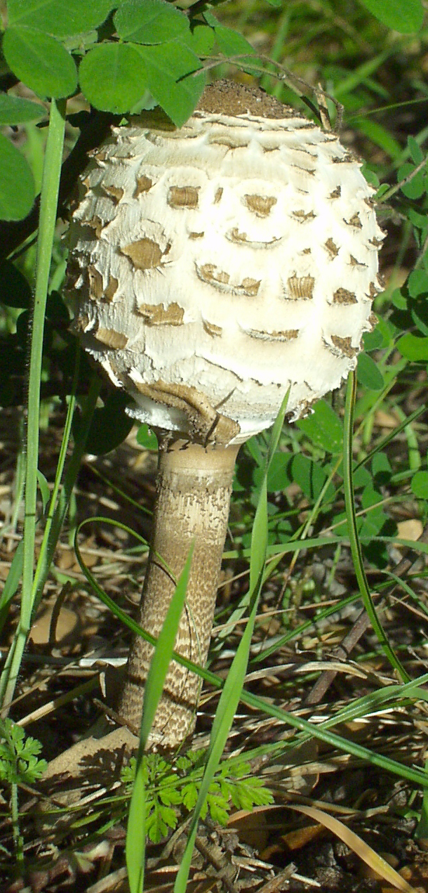 Macrolepiota procera (young)